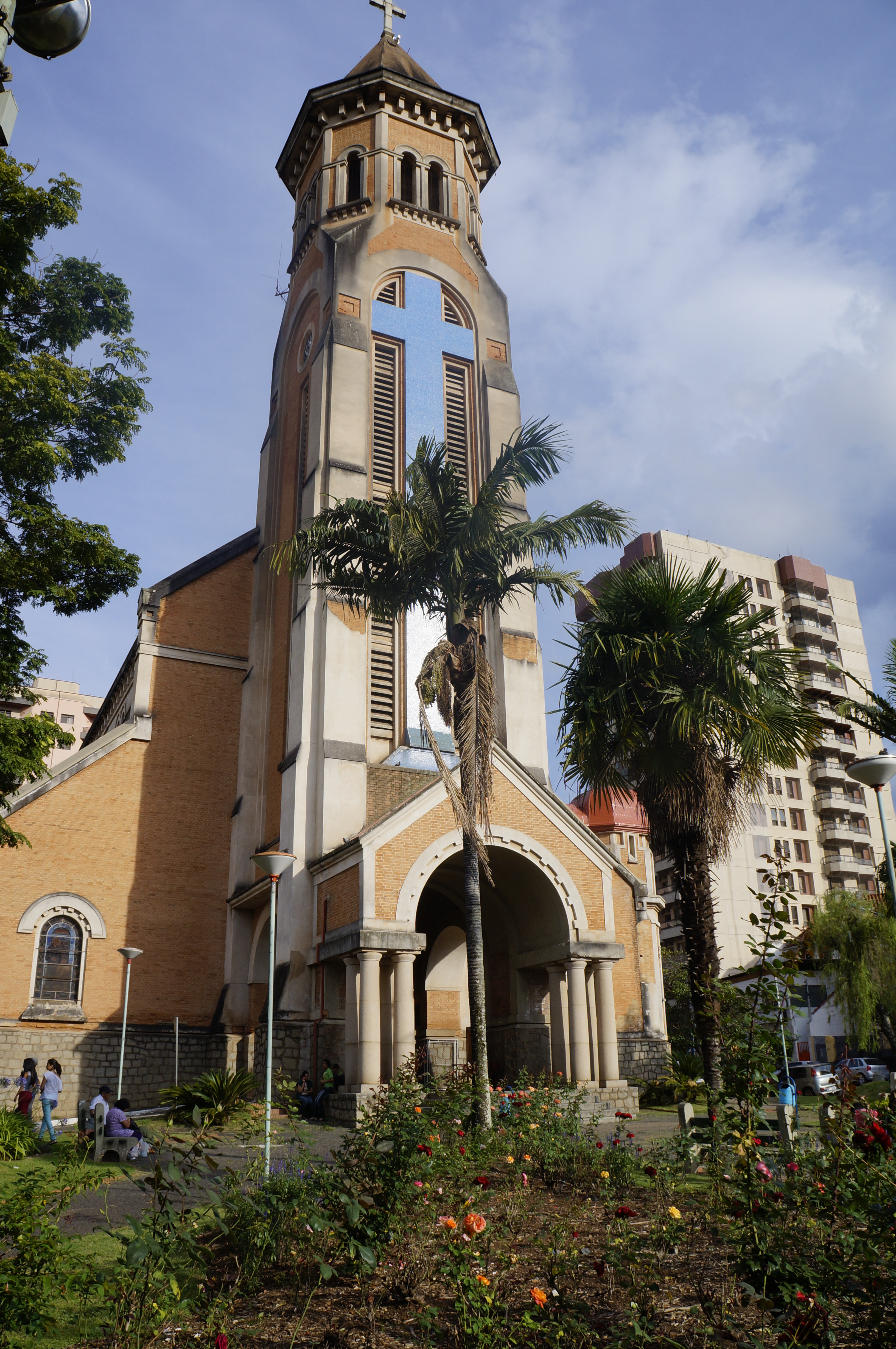 Basílica NS da Saúde